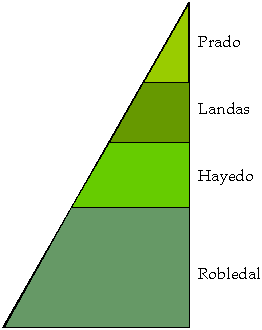 Esquema de la cliserie presente en la Cordillera Cantábrica. España.